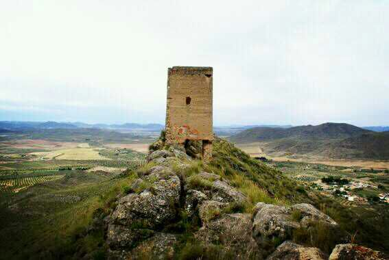 El Castellar situado entre las dos aldeas Sierra y Cordovilla (Tobarra)